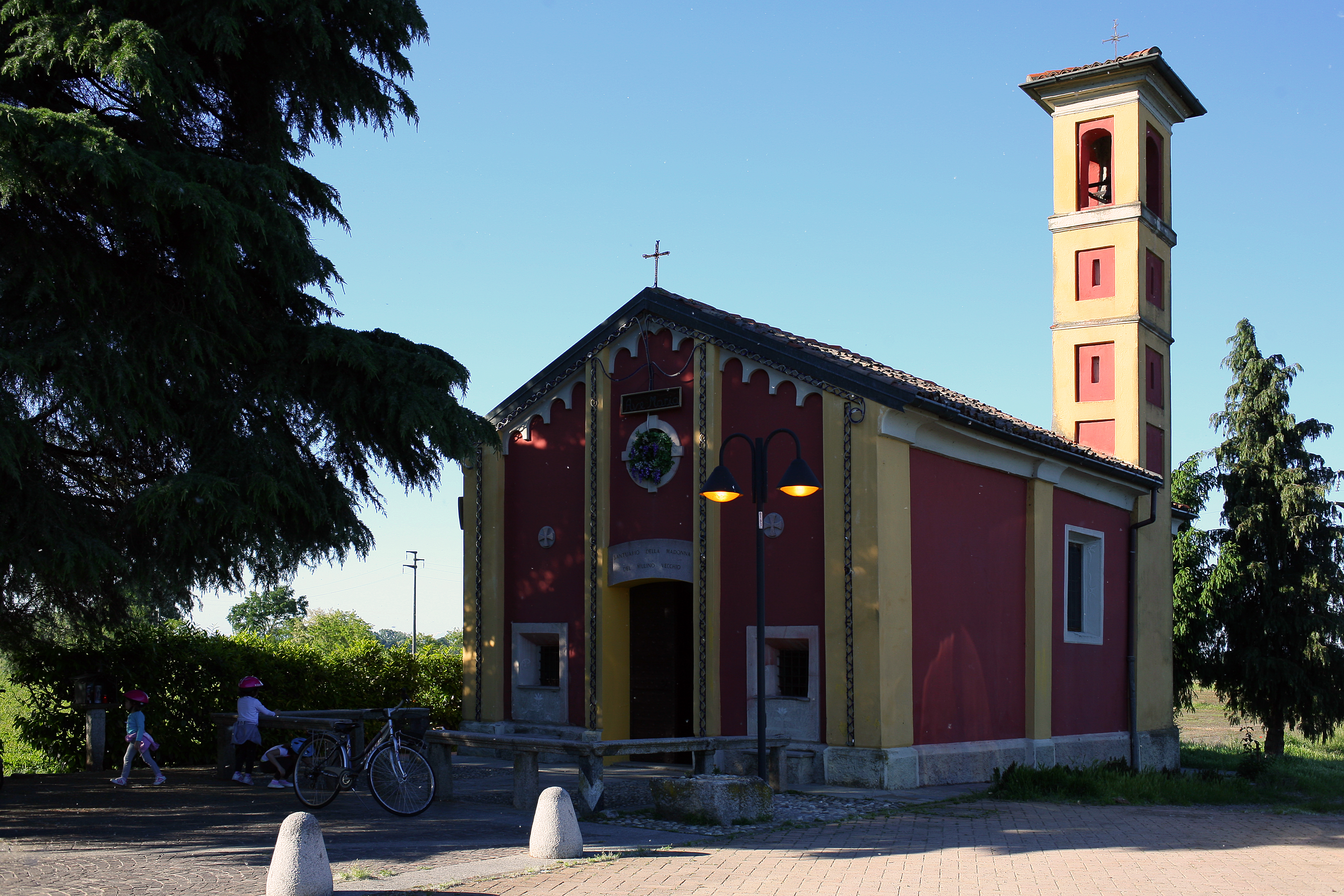 Moncucco (MI) Santuario della Madonna del Mulino Vecchio 1573